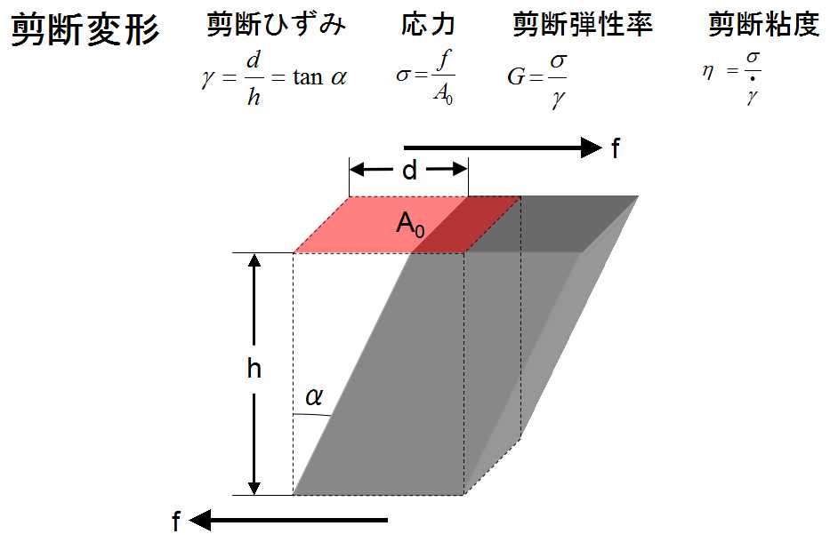 単純な剪断変形のモデル。dは変位、hは力と垂直な厚さ、αは倒れ角、γは剪断ひずみ、fは力、A_0は変形前における力と平行な断面積、σは応力、Gは剪断弾性率、ηは剪断粘度、上にドットの付いたγは剪断ひずみの時間微分である。